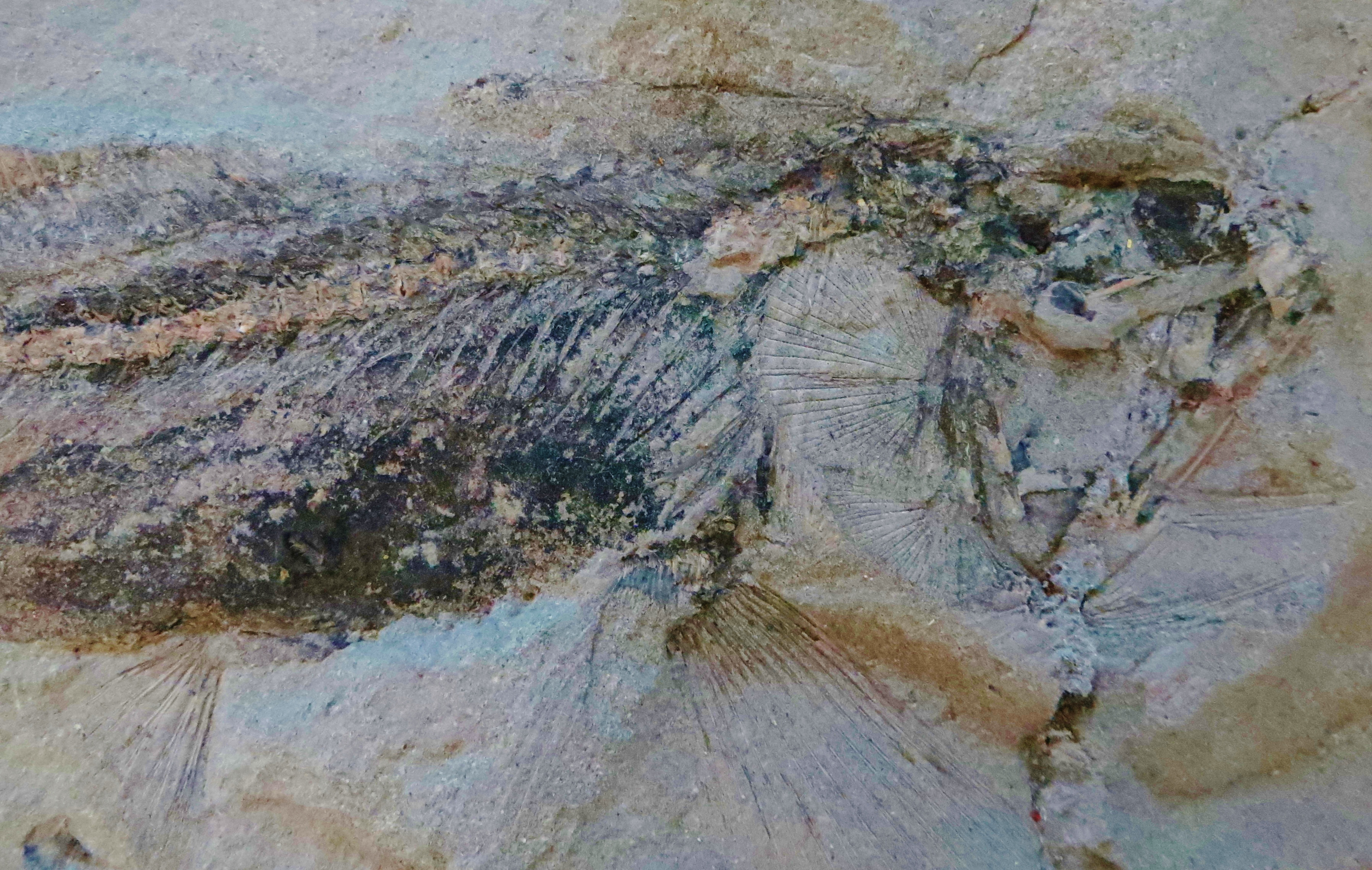 Fossil of Enchodus, an extinct fish- Took the picture at Teylers Museum, Haarlem